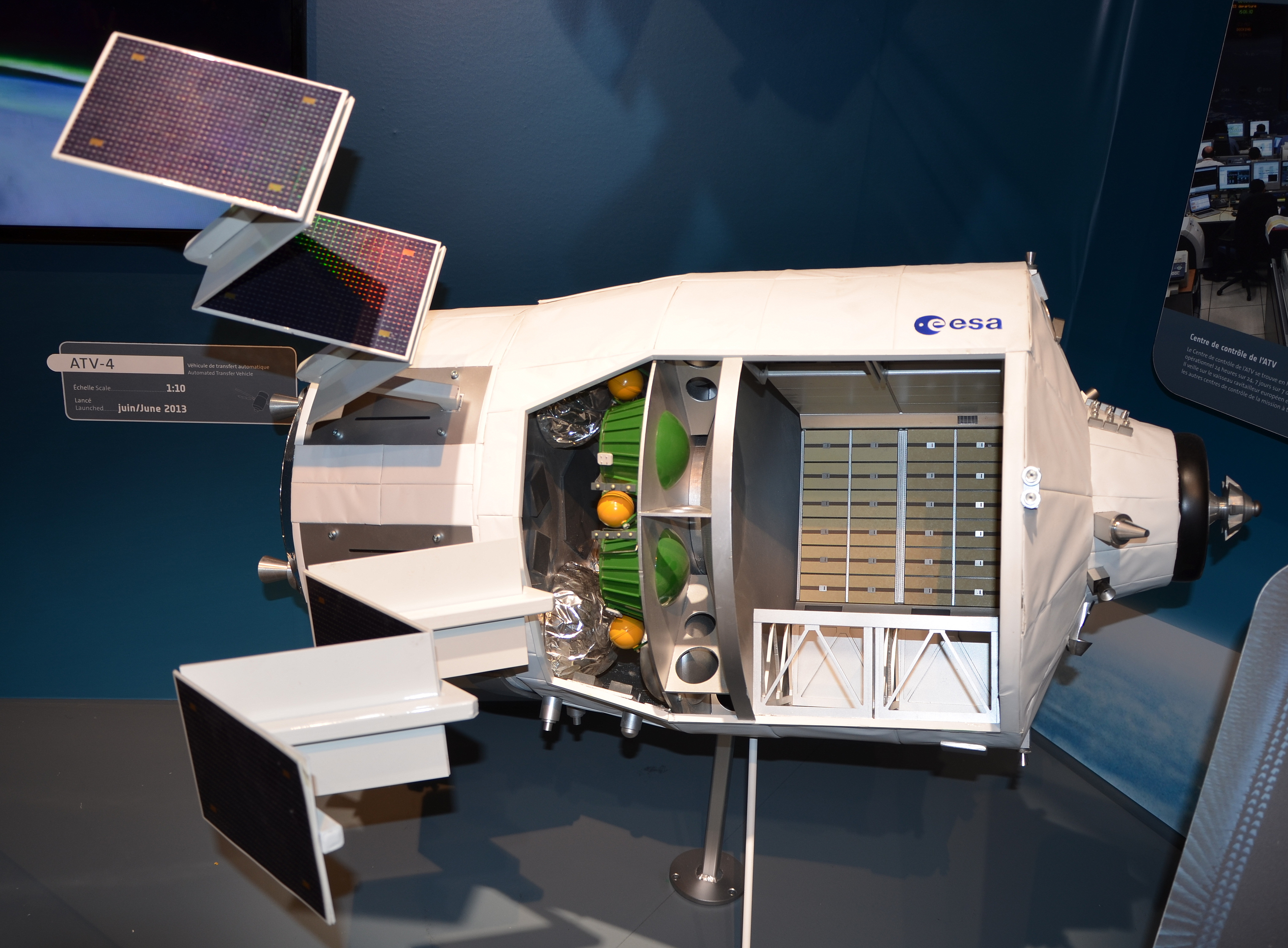 Maquette de l'ATV-4 salon du Bourget 2013